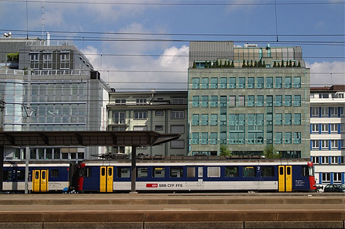 Bahnhof in Aarau